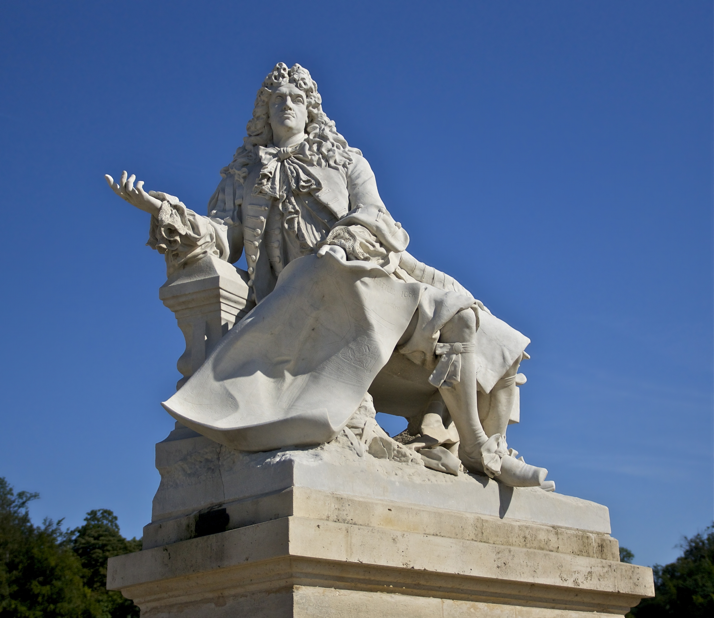 Le Nôtre, assis, tenant un plan des jardins du château de Chantilly